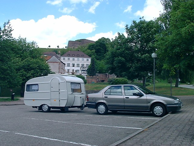 QEK-Junior Gespann (Seite); seitliche Ansicht des QEK Junior an einem Renault R19. Photographed Rene Hoferichter 31.05.2004 and placed in the public domain. Das Foto ist in Bitche entstanden, im Hintergrund ist die Zitadelle von Bitche zu sehen.